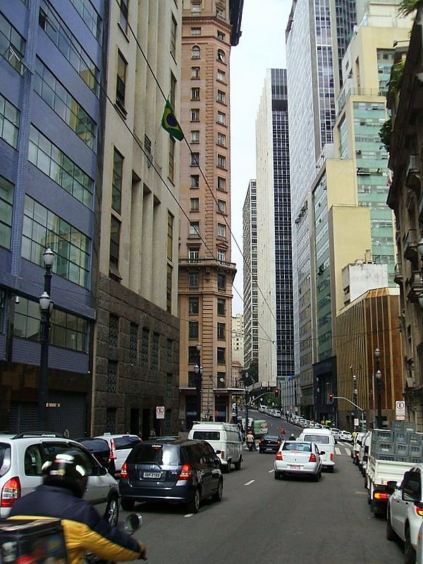 Rua Libero Badaró, no sentido Praça da Sé. Distrito da Sé, cidade de São Paulo, Brasil.